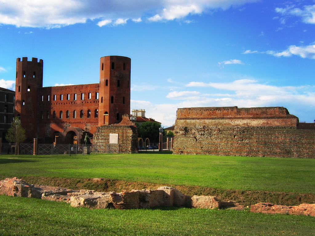 Torino, Piemonte, Italia